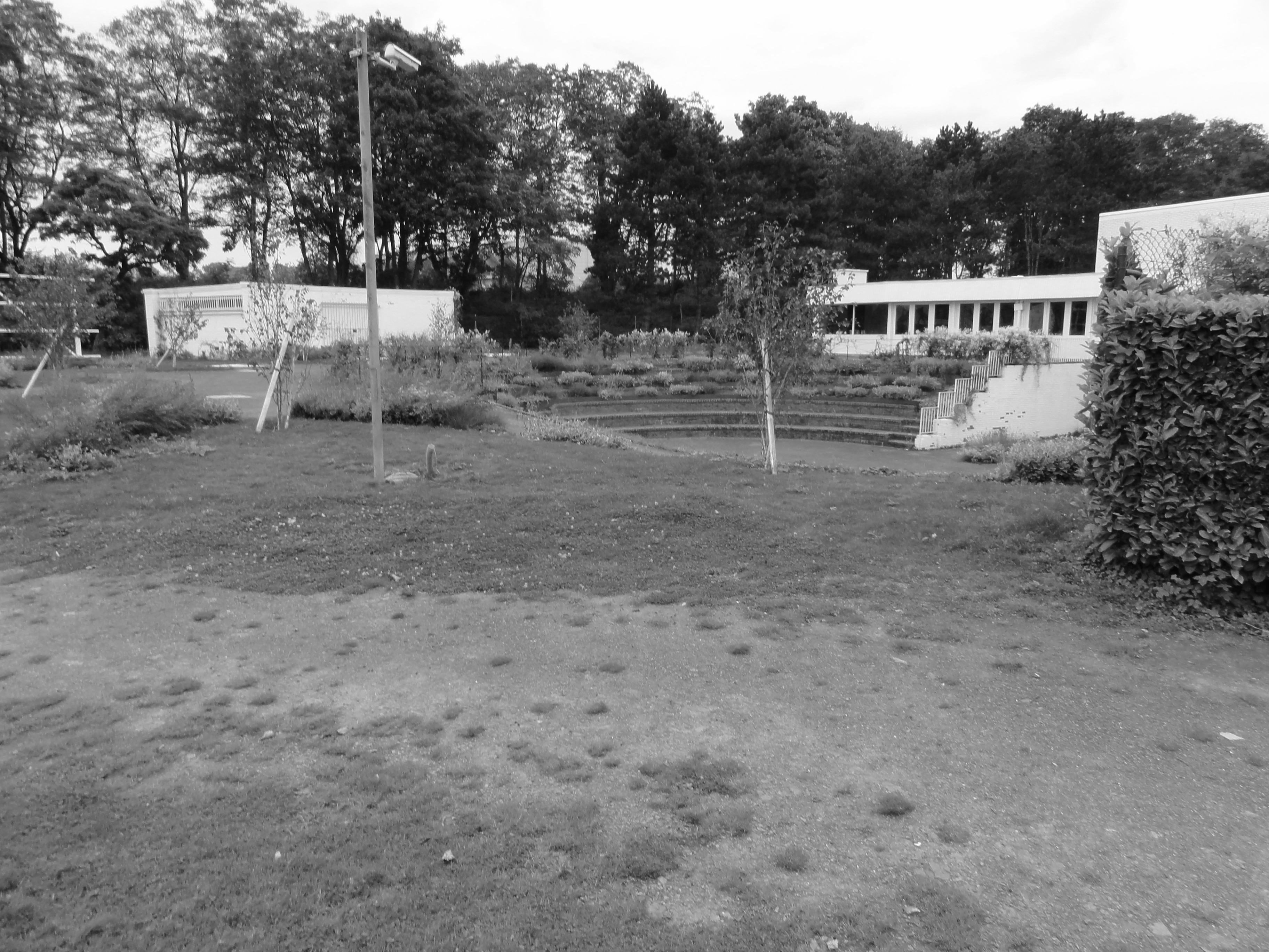 Terril n° 68 dit 9 de Lens, Fosse n° 9 de la Compagnie des mines de Lens, Lens, Pas-de-Calais, Nord-Pas-de-Calais, France.